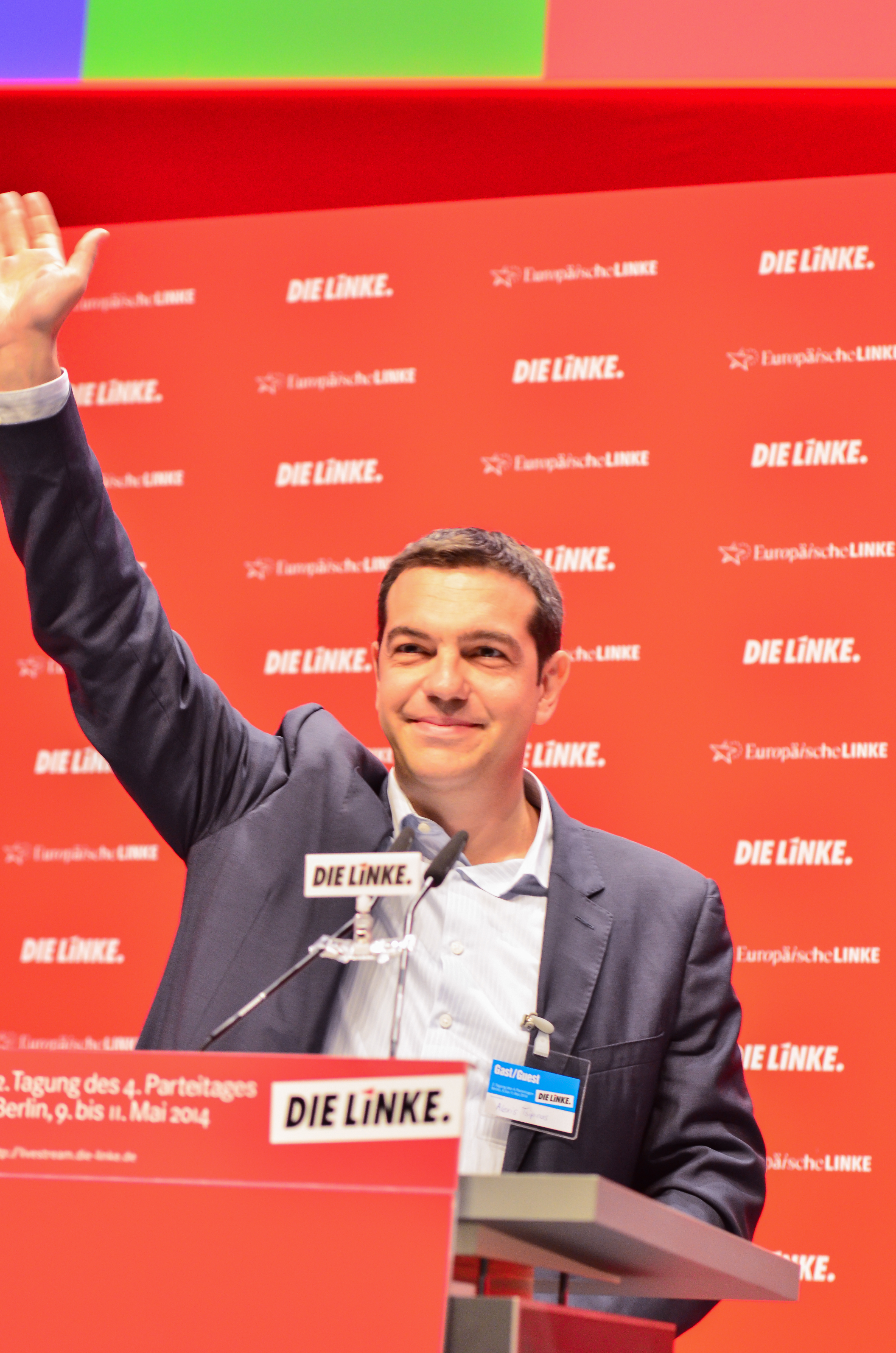 Bundesparteitag DIE LINKE Mai 2014 in Berlin, Velodrom: Alexis Tsipras, Spitzenkandidat für die Europawahl 2014 der Europäischen Linken